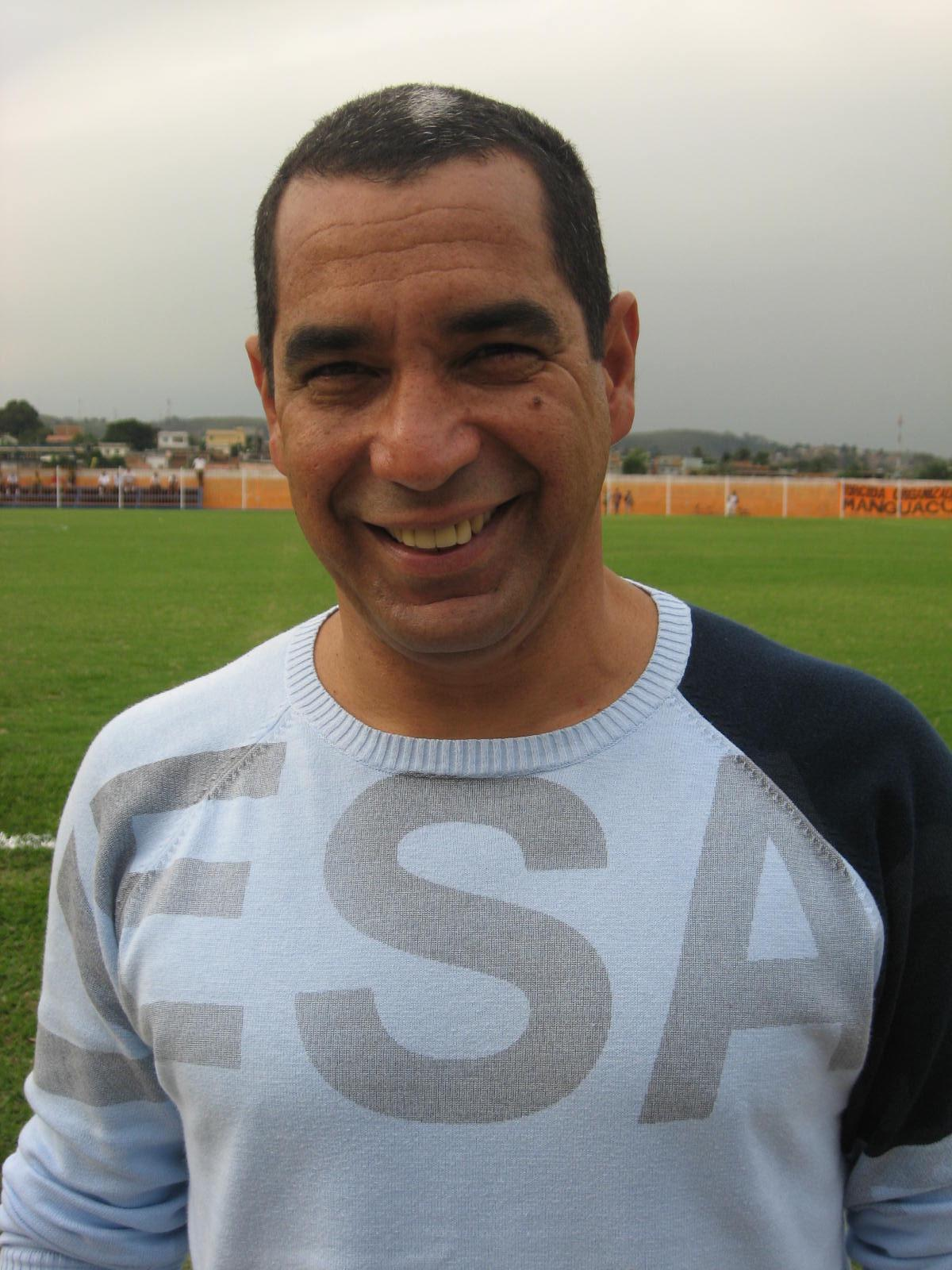 Zinho, ex-jogador da Seleção Brasileira, do Flamengo e do Palmeiras.